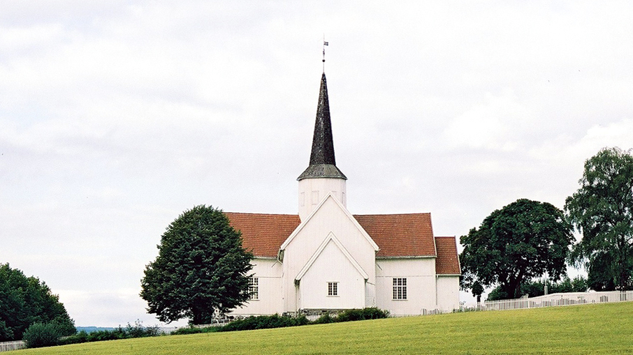 Brøttum kirke, Ringsaker